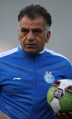 گزارش تصویری نیمه اول استقلال مقابل استقلال خوزستان